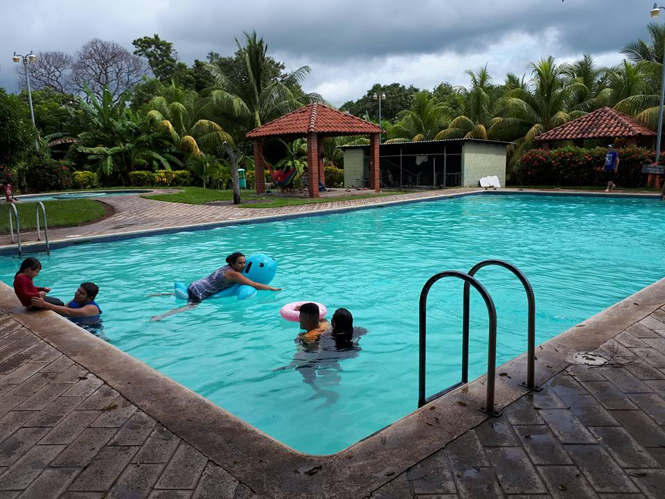 eXCELENTE